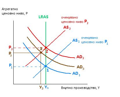 Поради тоа што јавноста очекува кривата на агрегатната побарувачка да се помести до AD2, краткорочната крива на агрегатна понуда се поместува до AS2. Кога фактичката експанзивна политика не ги исполнува очекувањата на јавноста (кривата на агрегатна побарувачка се поместува само до AD2, економијата завршува во точка 2, во пресекот на AD2 и AS2. И покрај експанзивната политика на проширување, вкупното производство паѓа до Y2.